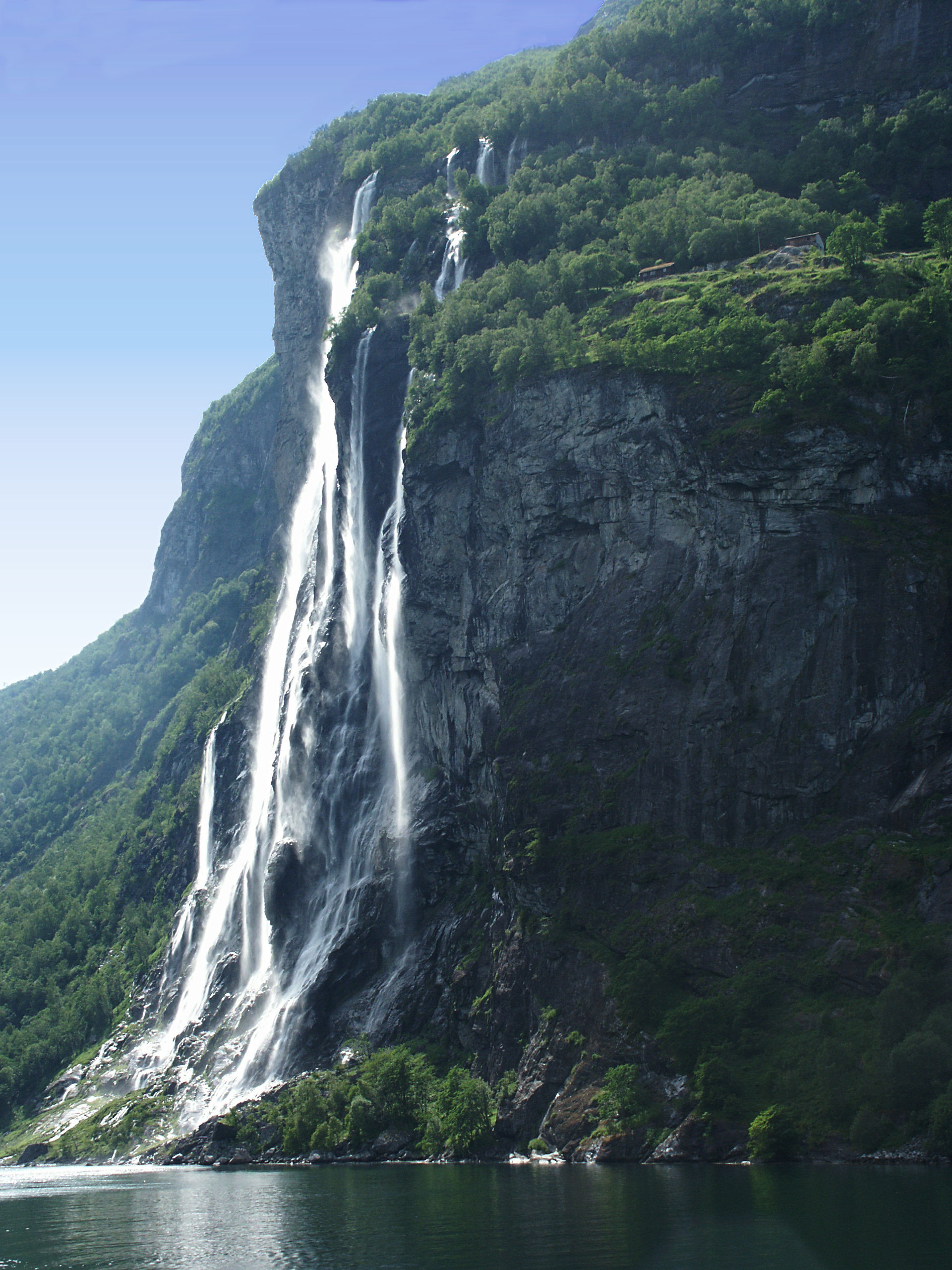 Knivsflå